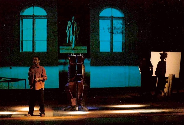 Peinture de Piotr Szmitke